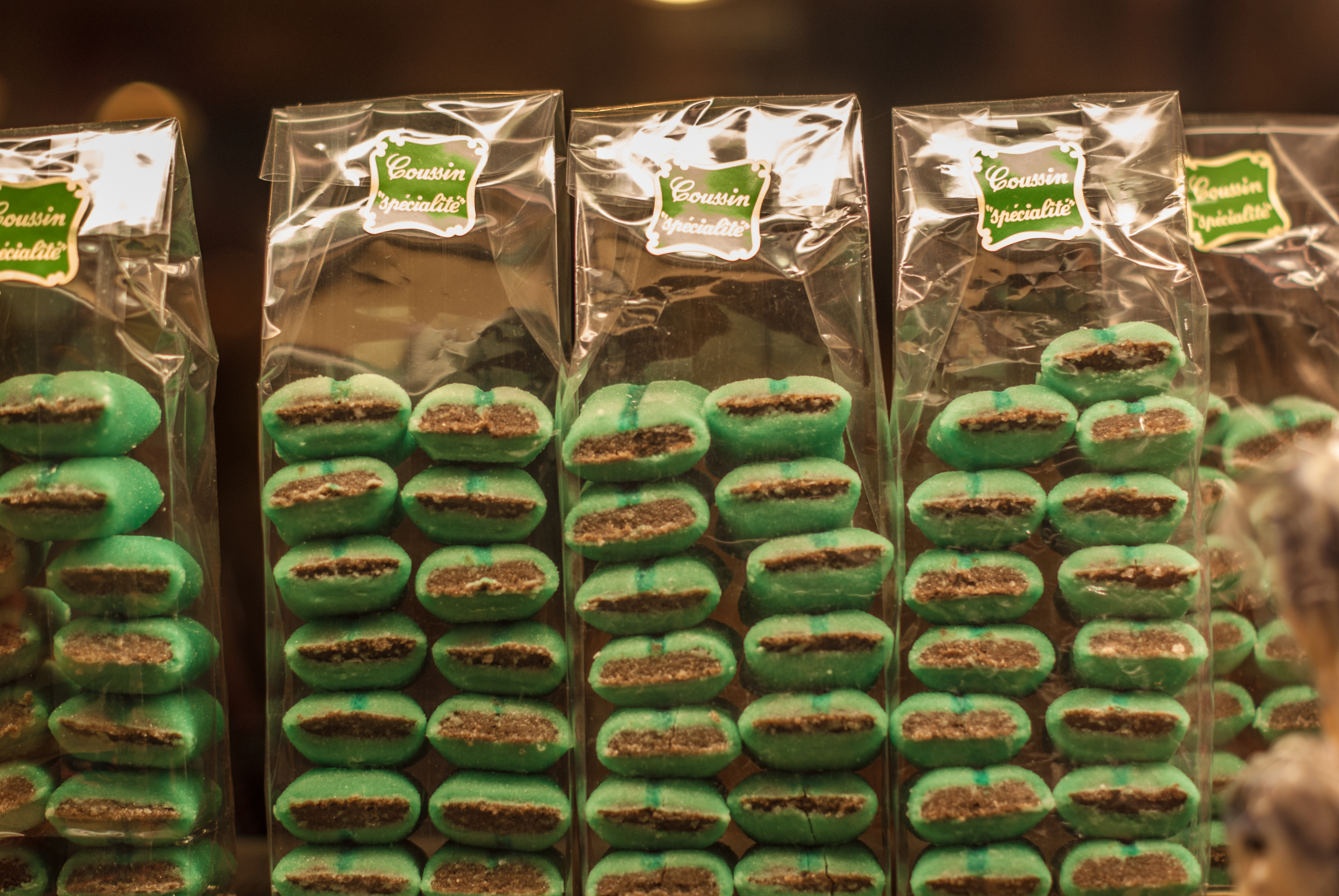 Sachets de Coussins de Lyon visibles dans une vitrine de la Rue Saint-Jean (69005 Lyon)